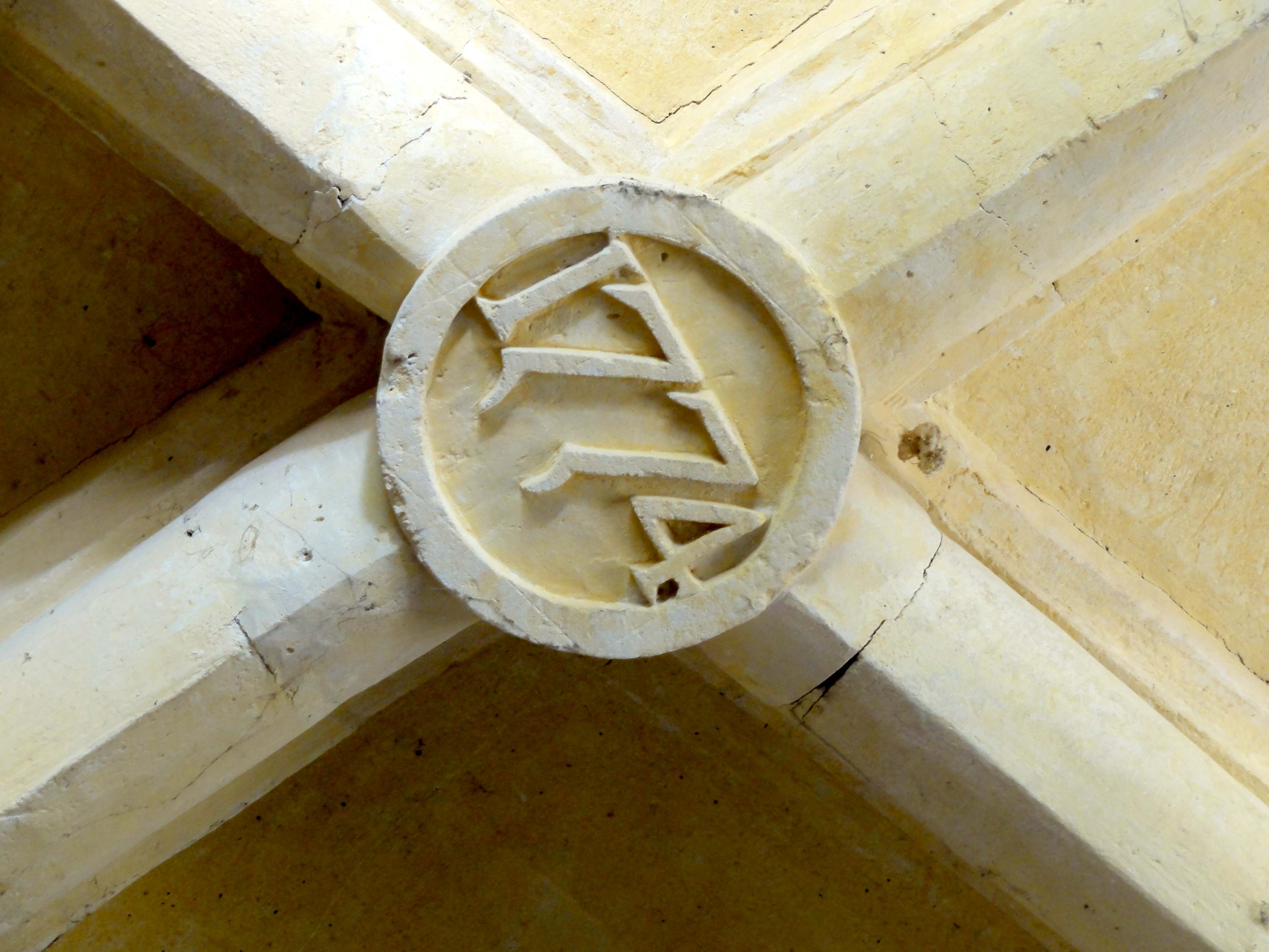 Clé de voûte (voir titre).